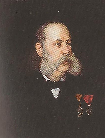 Porträt von Georg Rebhann Ritter von Aspernbruck (1824–1892), Rektor der Technischen Hochschule Wien